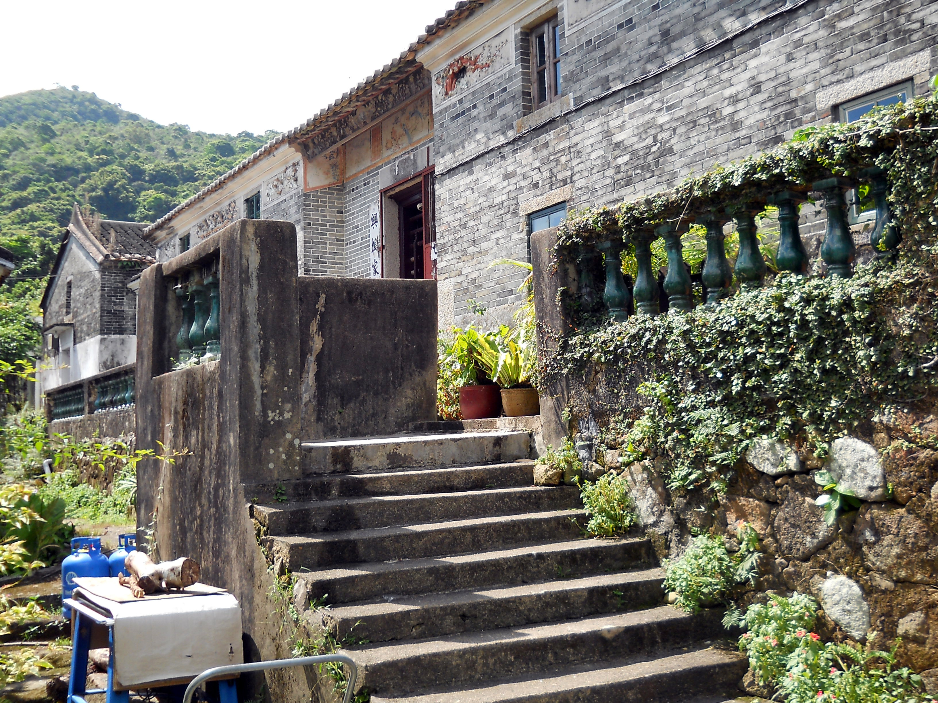 中文（香港）: 白沙澳何氏舊居門樓